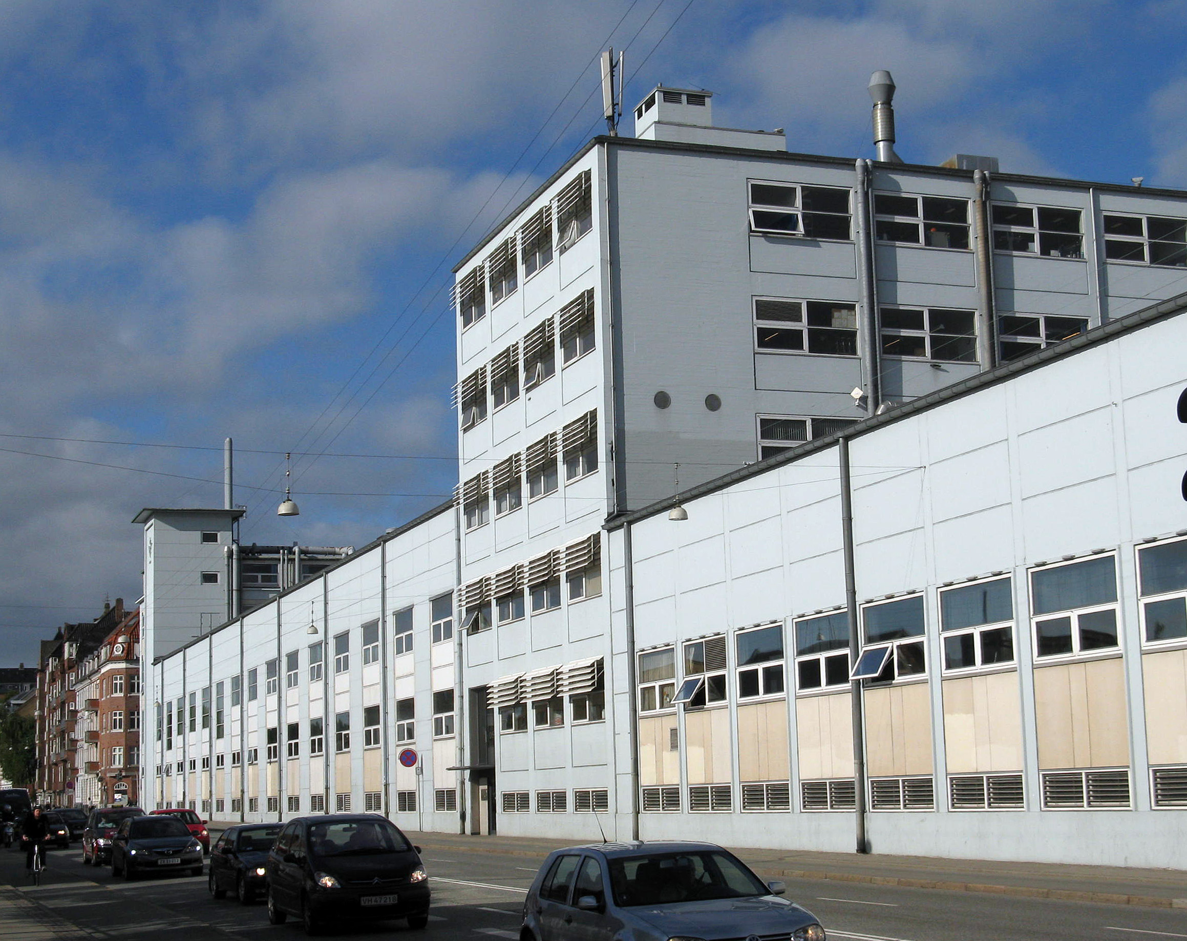 DSBs Centralvaerkstedet ved Spanien i Aarhus